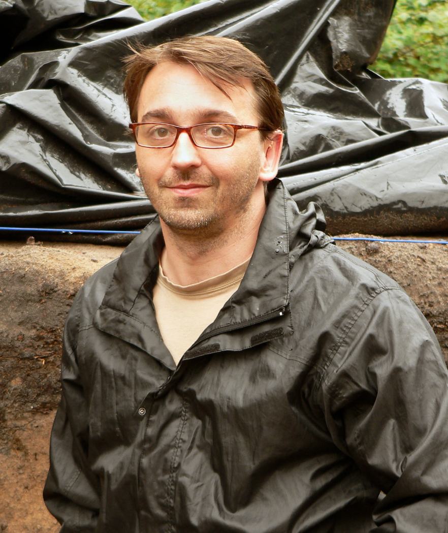 Tobias Scholz bei der Ausgrabung in Liebenau